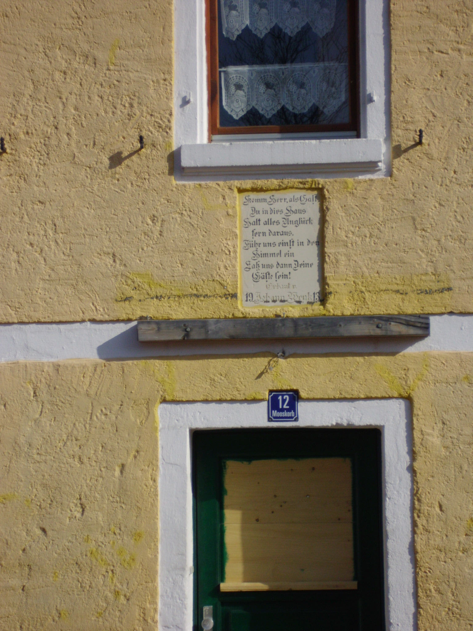 Hausinschrift in Mooskorb, Ortsteil von Gunzenhausen im fränkischen Landkreis Wießenburg-Gunzenhausen